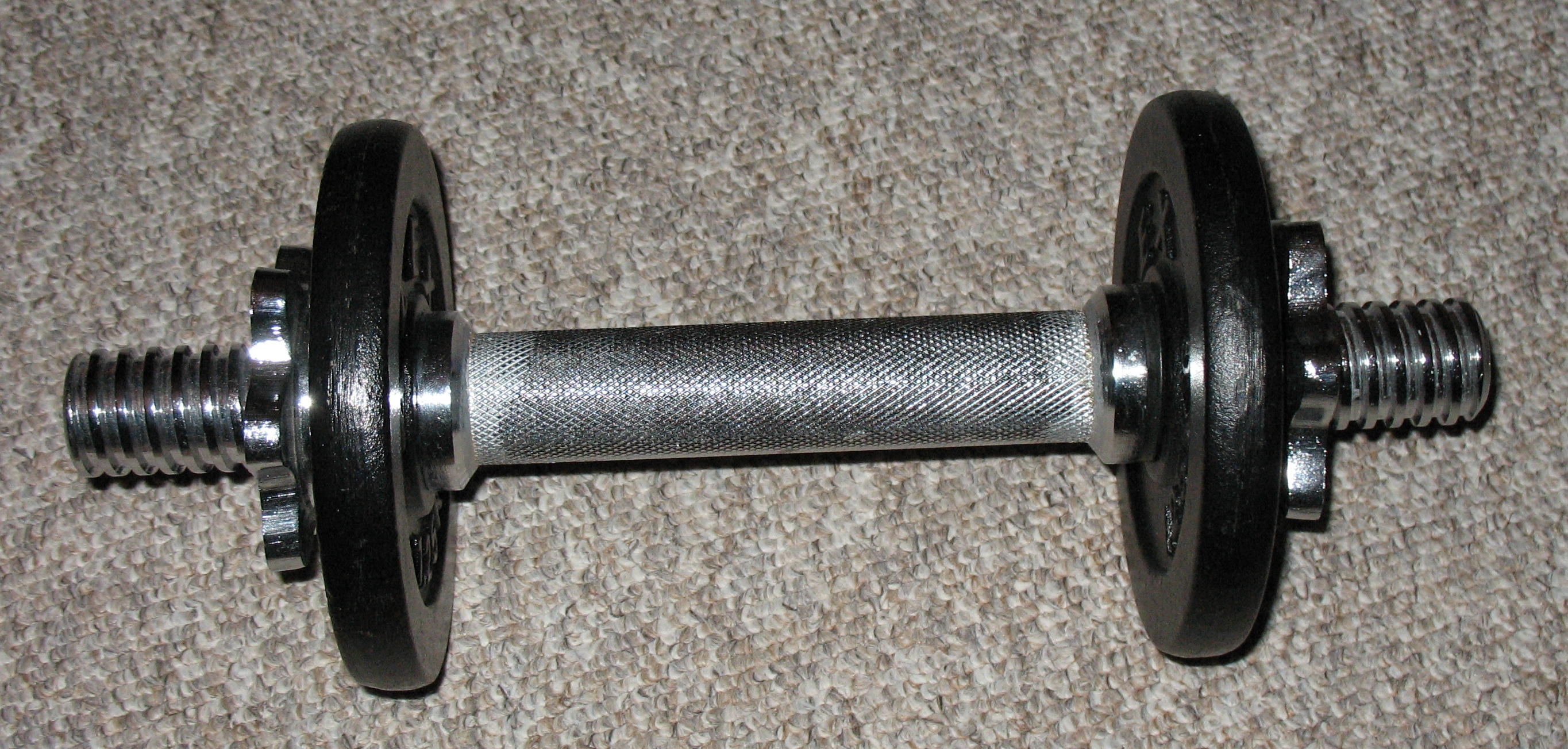 A dumbbell (Hantel)